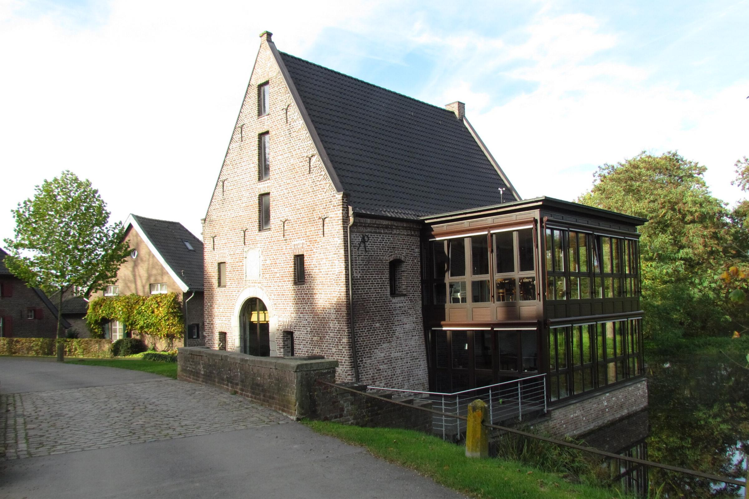 Wassermühle im Kreis Kleve